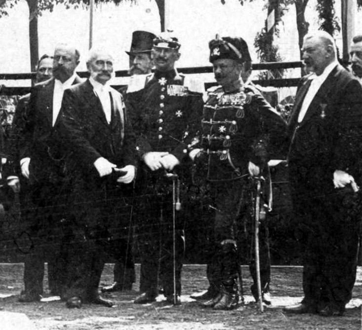 Detail aus einer Aufnahme der Grundsteinlegungsfeier am 31. Mai 1895.